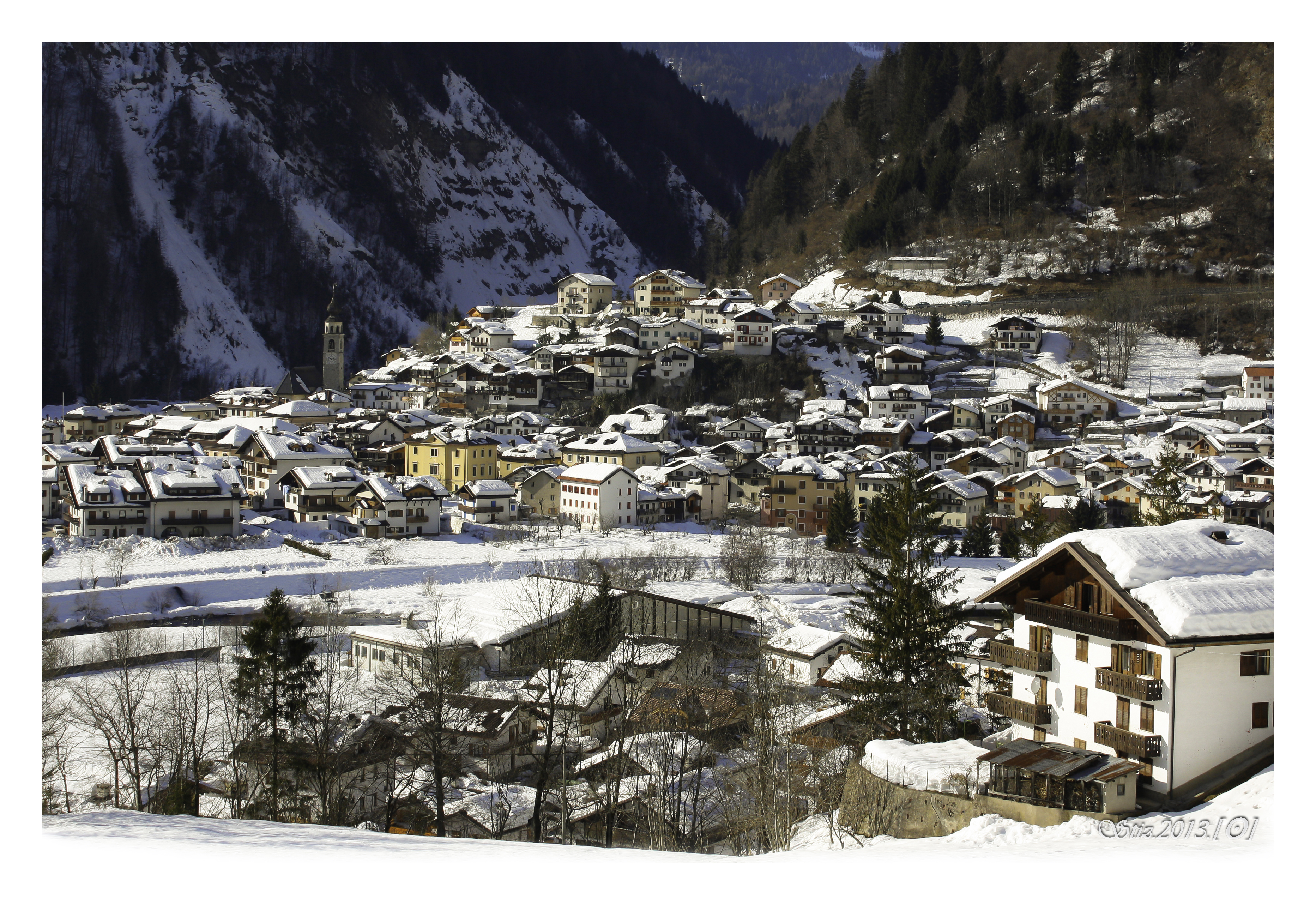 Panorama